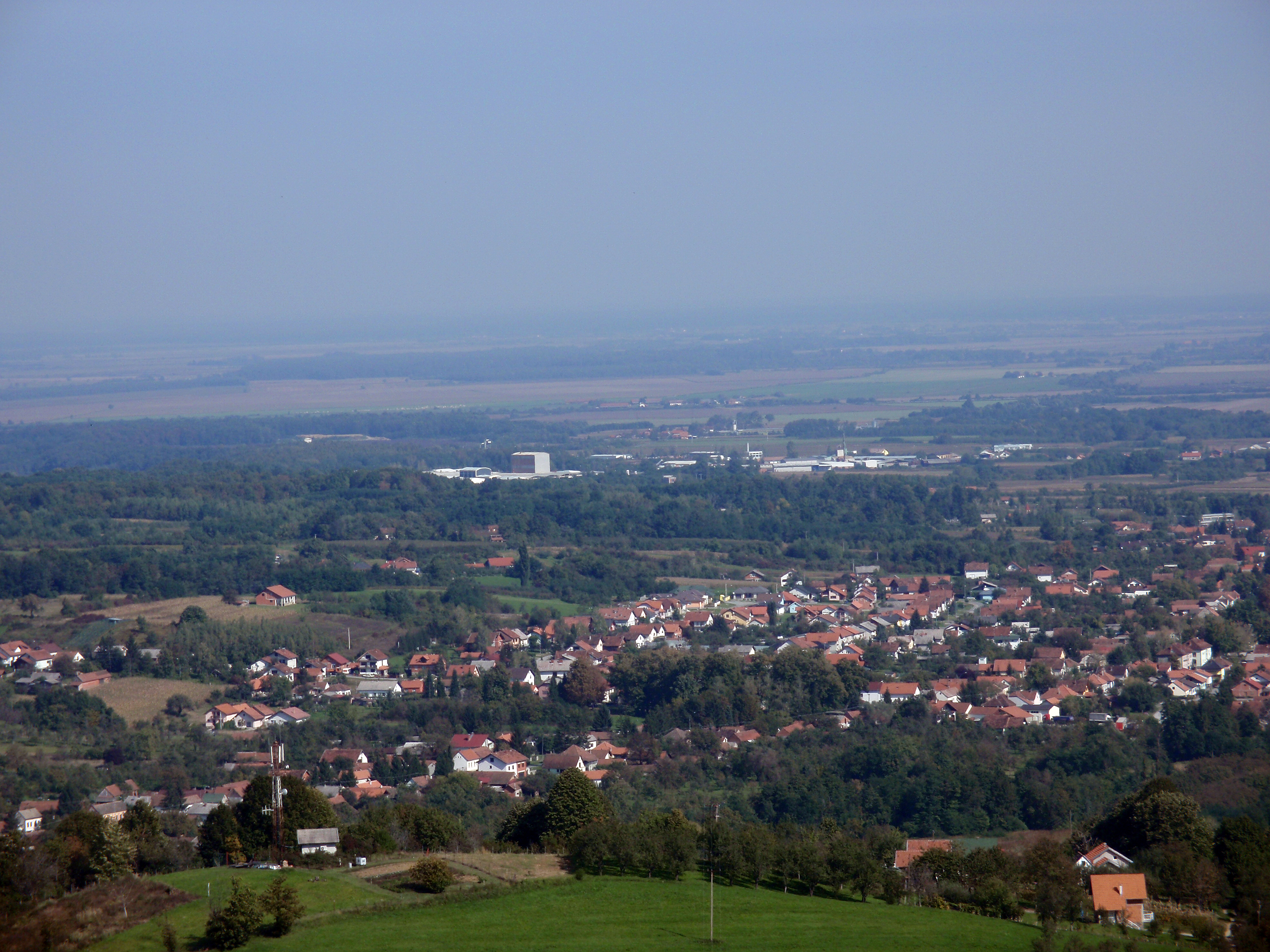 Pogled s Ružica grada, najvećeg sačuvanog dvorca u Slavoniji i jednog od najvećih u Hrvatskoj